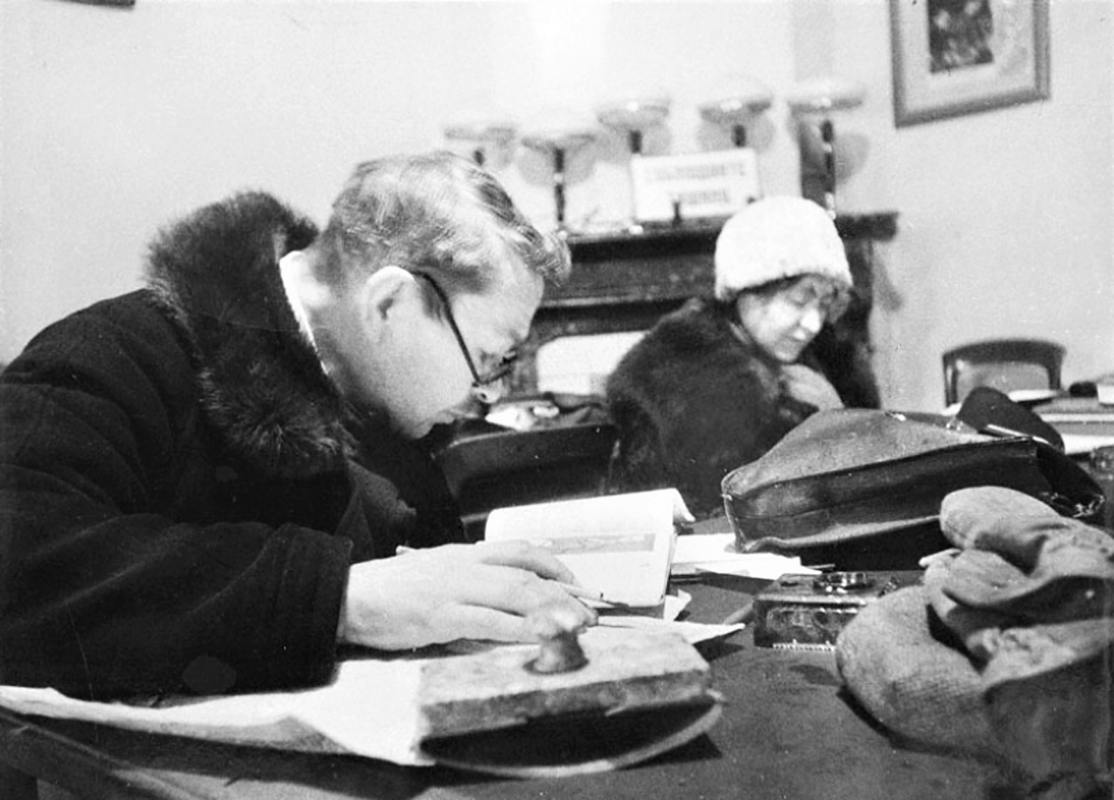 Посетители в читальном зале Государственной публичной библиотеки имени М.Е. Салтыкова-Щедрина